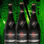 Hachenburger Selection